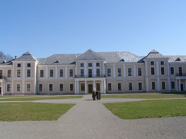 Wiśniowiec - pałac Wiśniowieckich